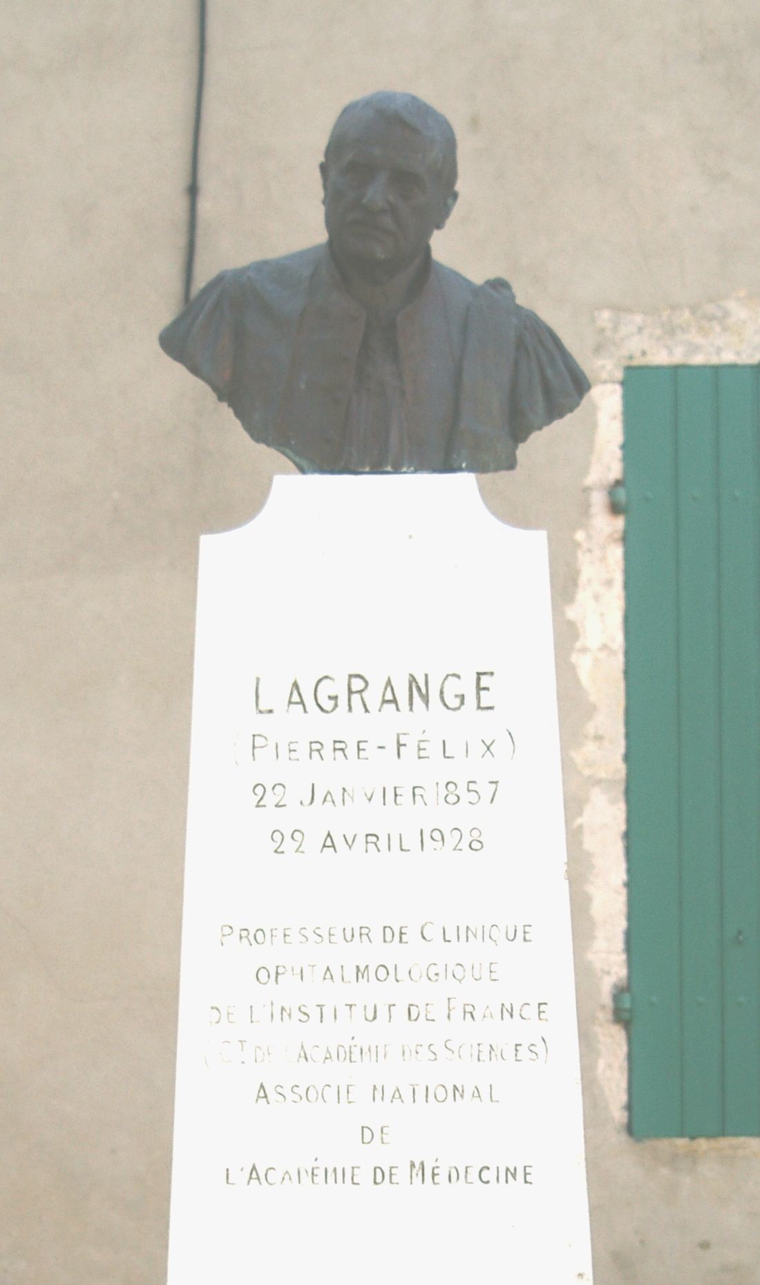 Buste du professeur Lagrange situé à Soumensac (Lot-et-Garonne)